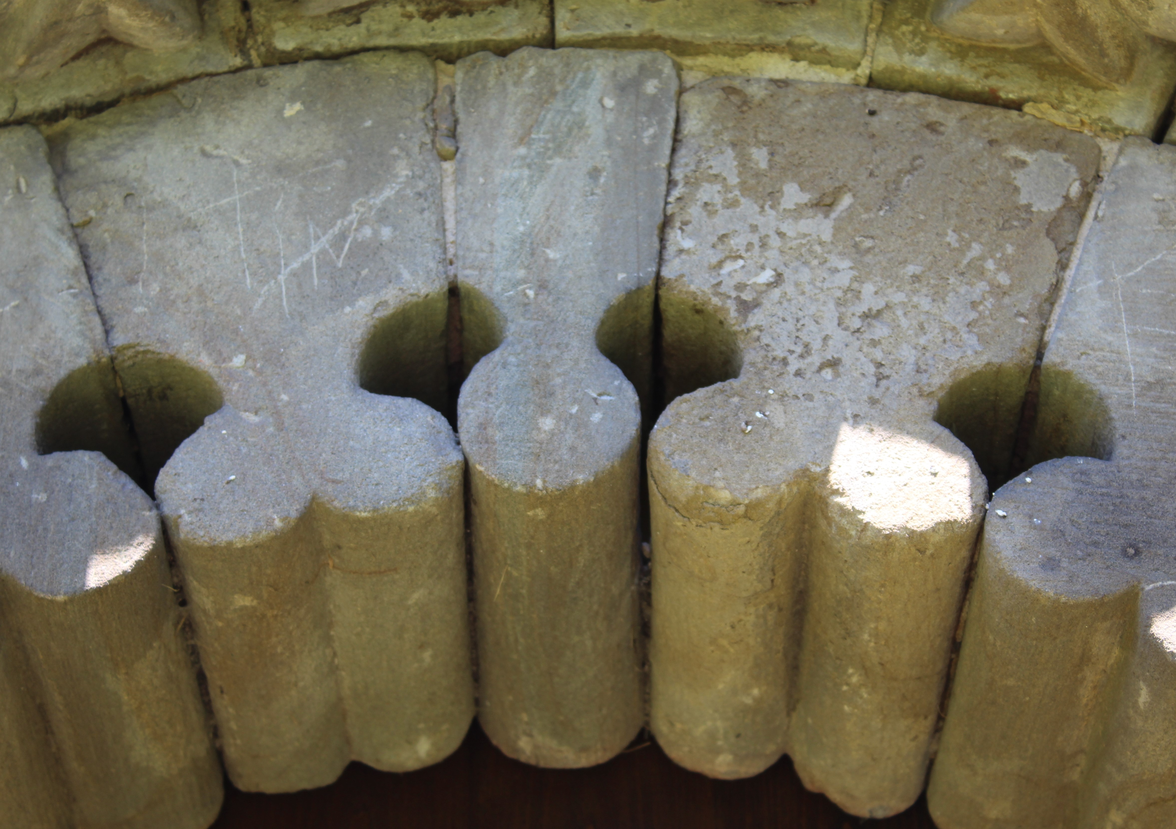 Detalle de rollos zamoranos en el arco del pórtico sur.